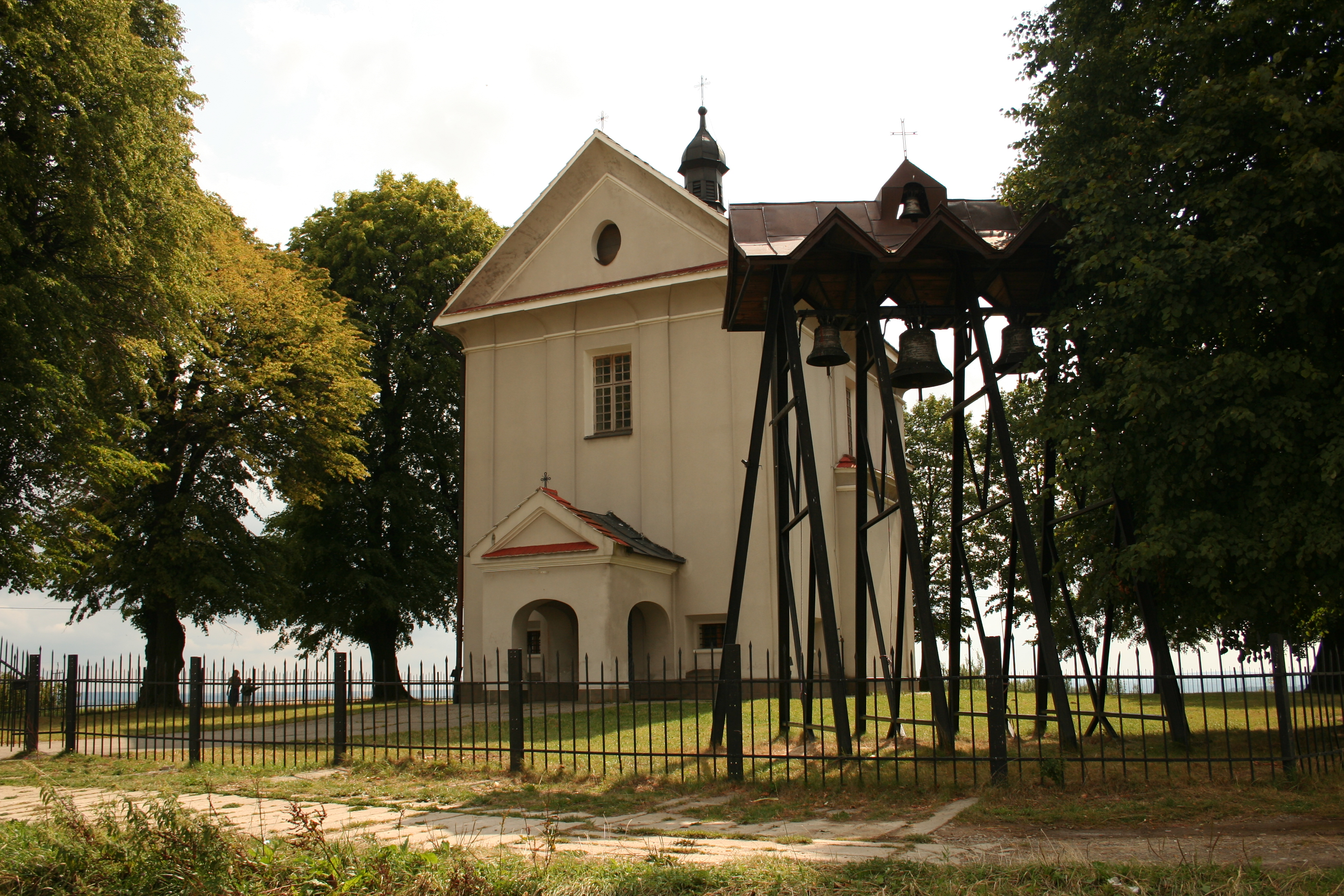 Kościół pw. św. Magdaleny w Malawie, powiat rzeszowski